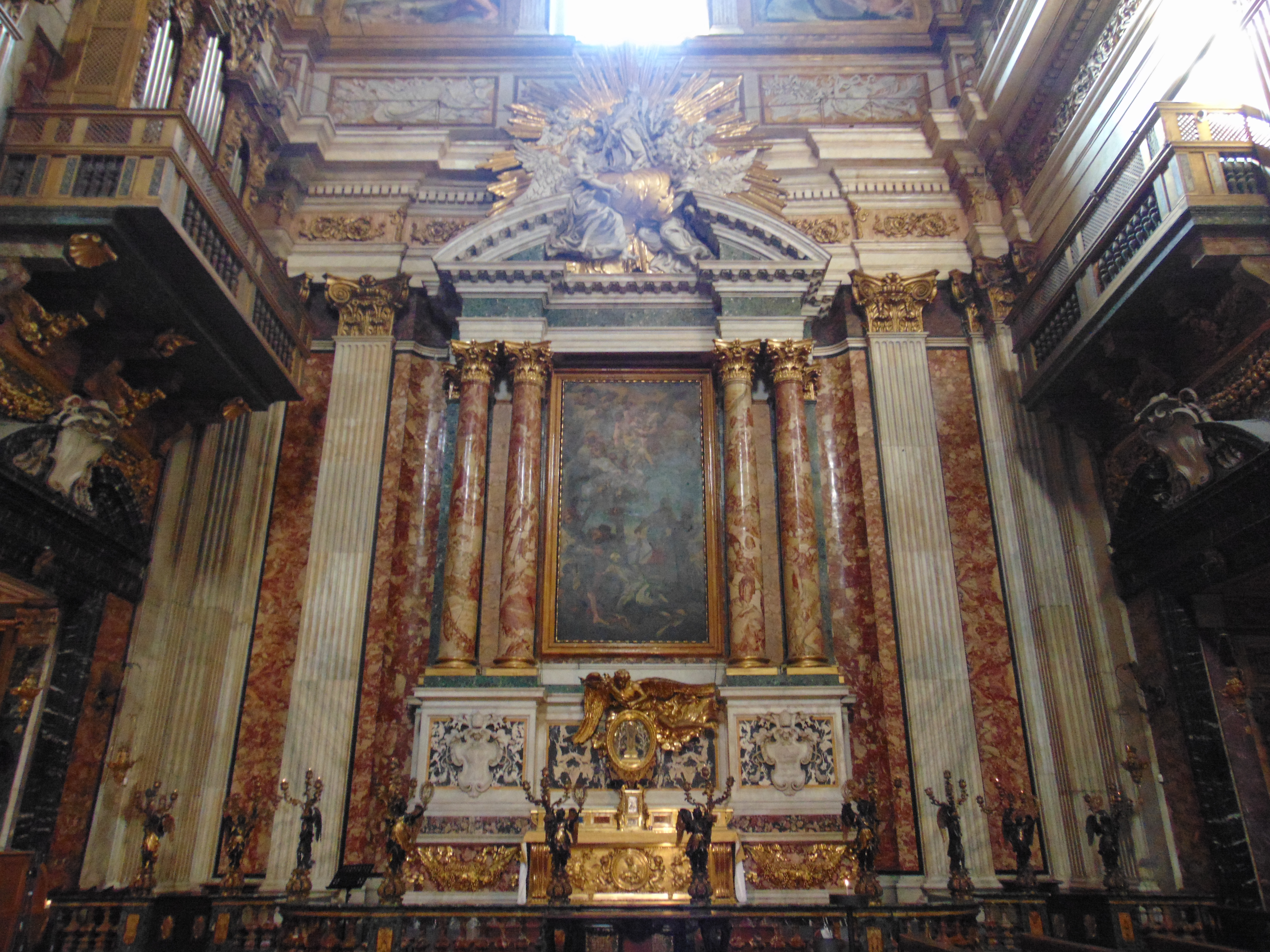 Chiesa del Gesù